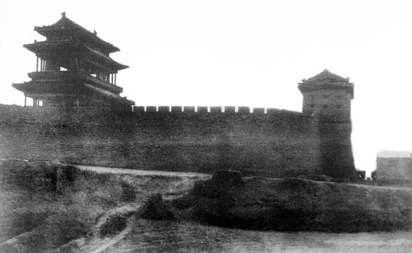 北京广安门城楼，出自《北京的城墙和城门》。